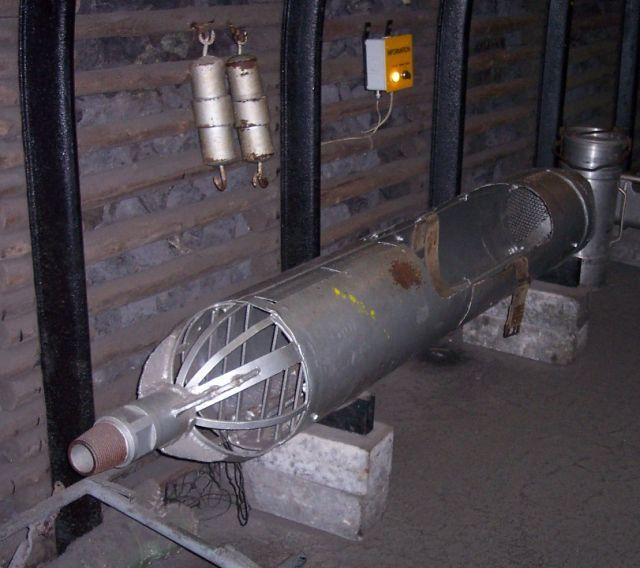 Dahlbusch Bombe